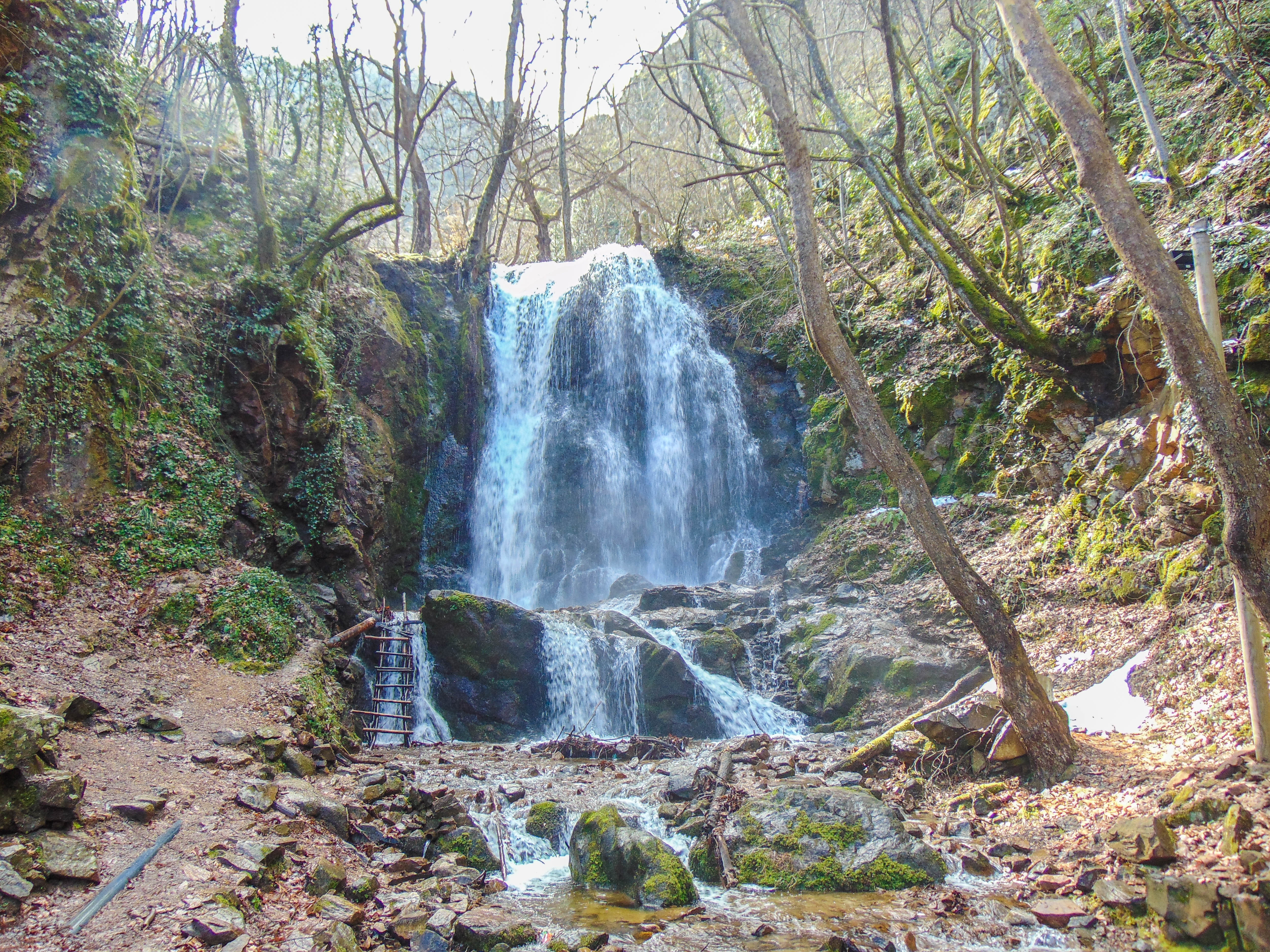 Колешински водопад